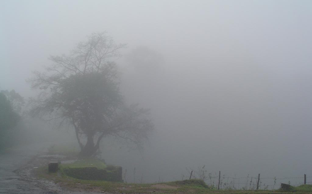 Madikeri on a misty morning